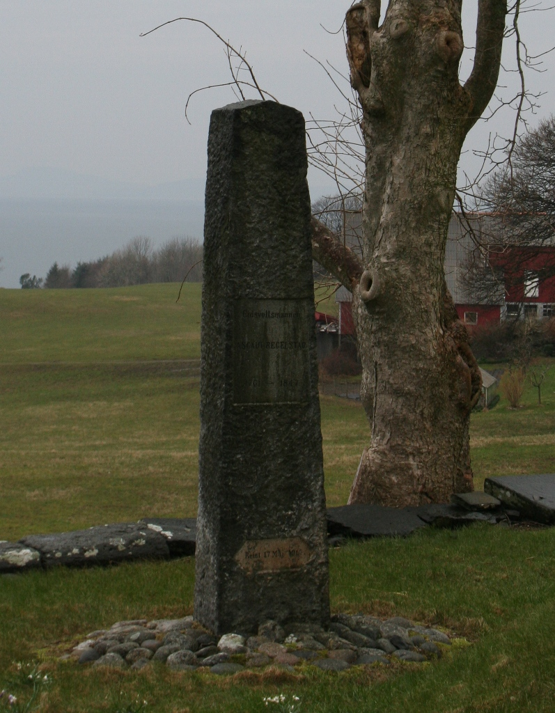 Asgaut Olsen Regelstad - minnesmerke utenfor Hesby kirke på Finnøy, Rogaland